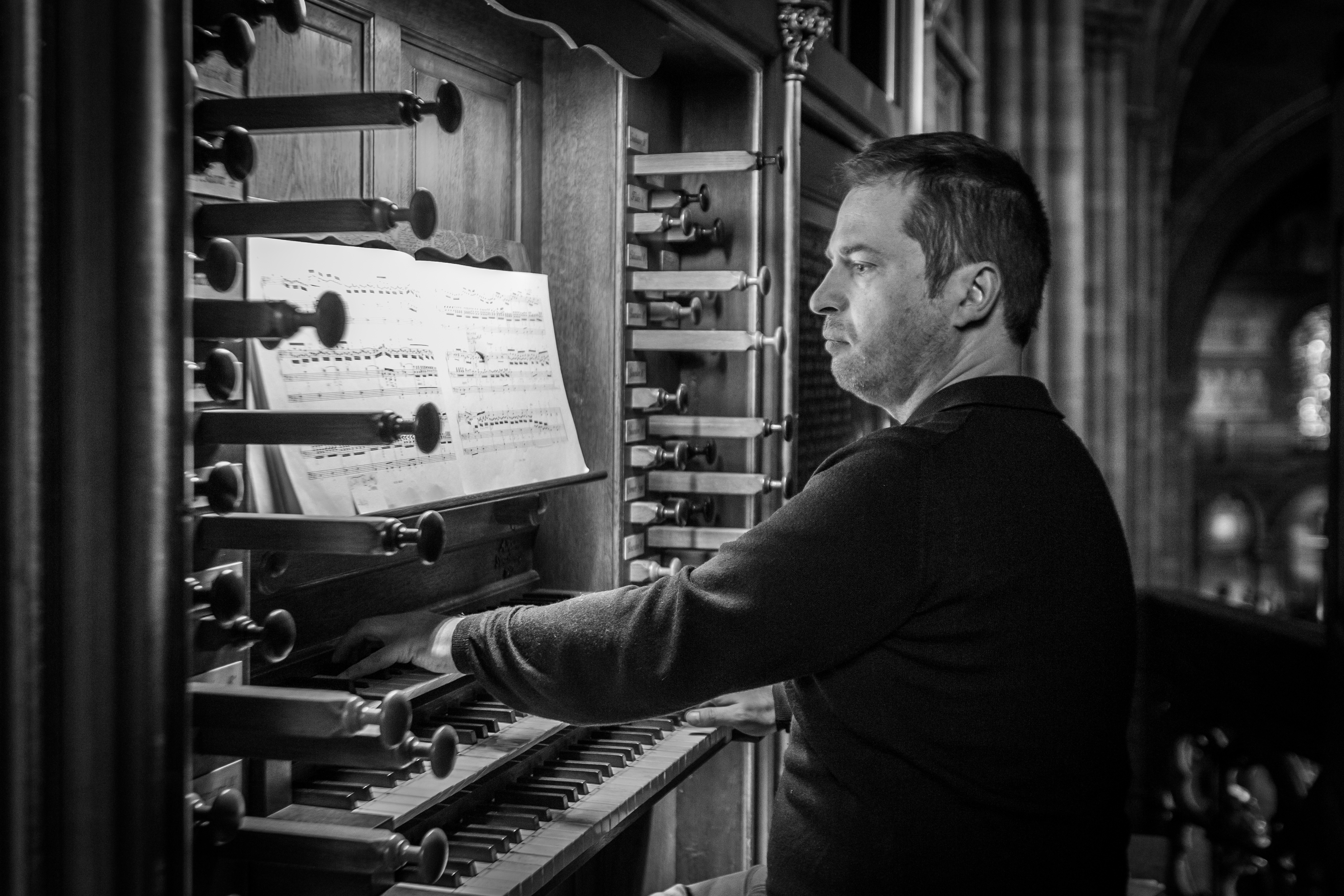 Vincent Warnier, né le 14 octobre 1967 à Hayange (Moselle), est un organiste français.